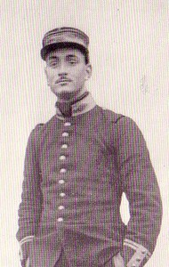 Le Capitaine Marcel Carpentier (90ème Régiment Infanterie) blessé en 1915 à Neuville St Vaast